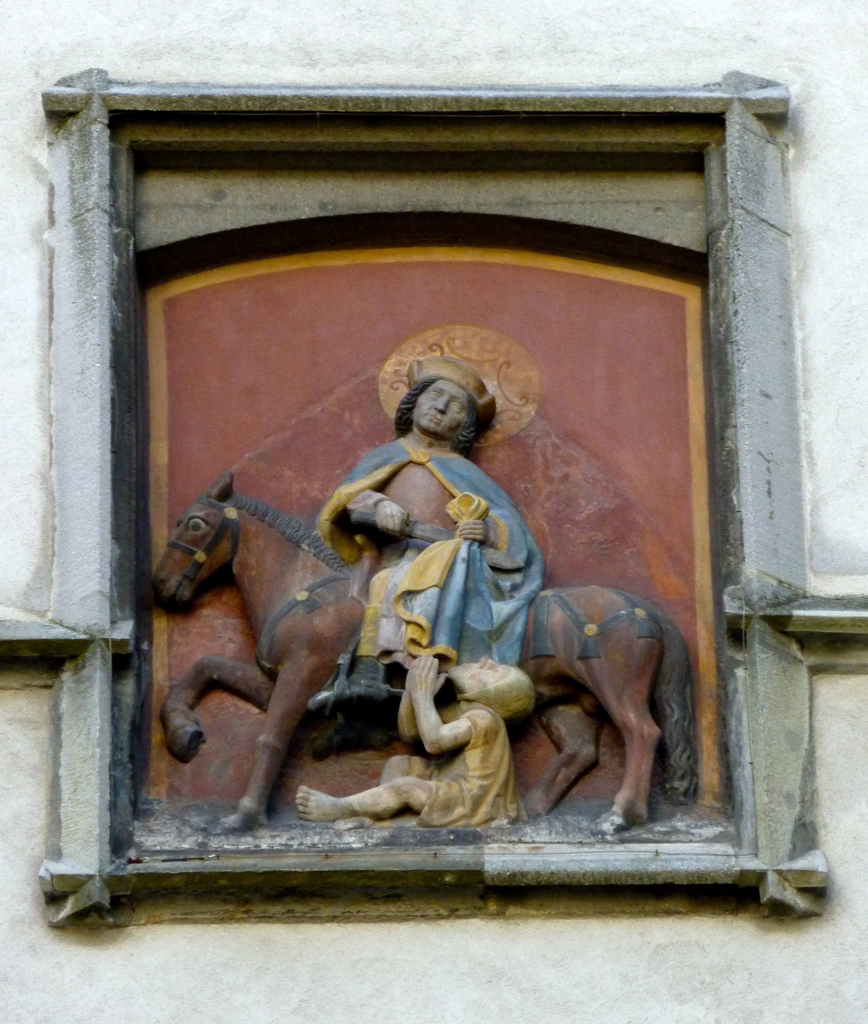 St. Martin (Chur), Turmrelief